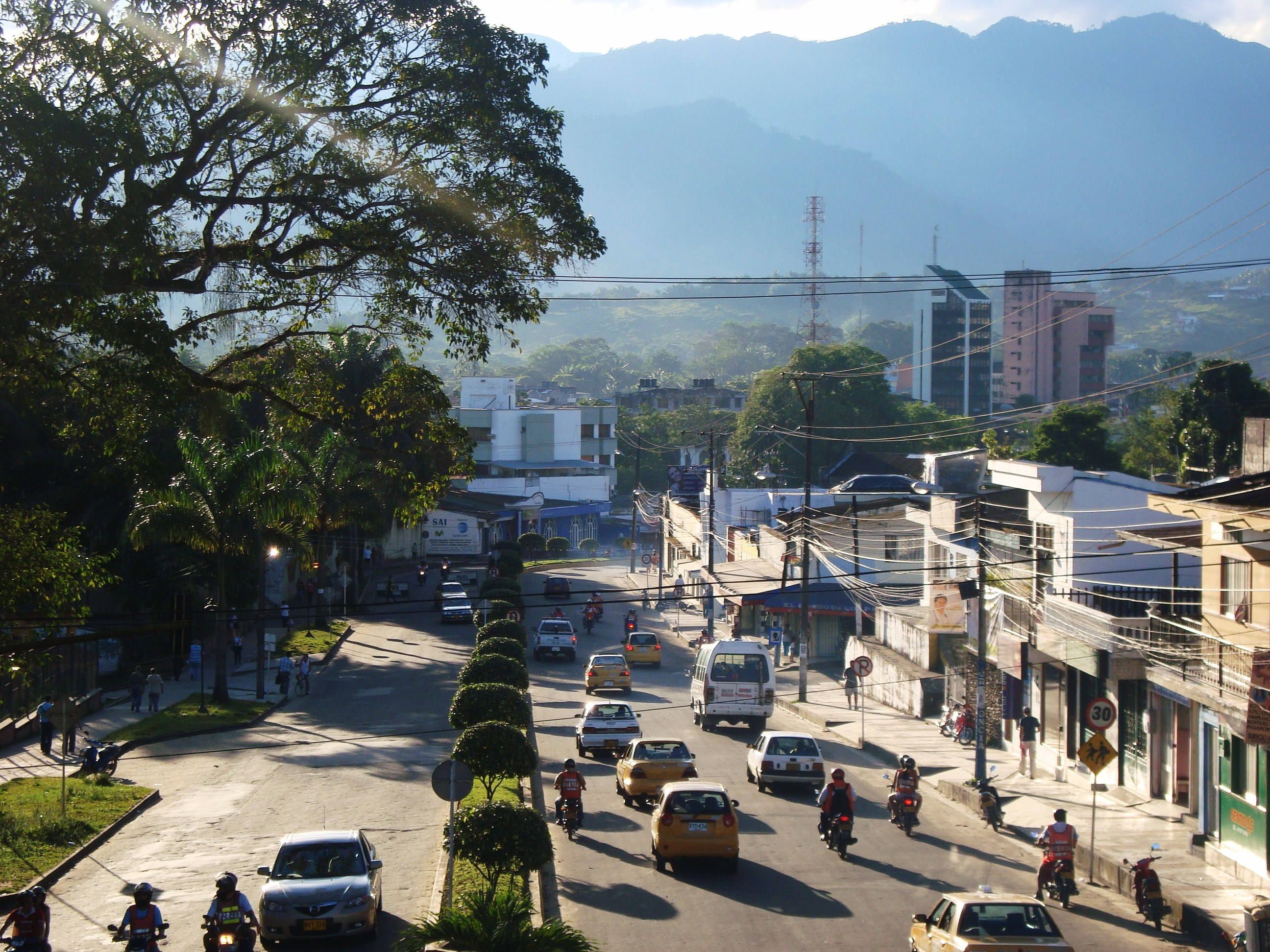 Avenida Paseo de los Fundadores - Carrera 11 hacia el centro de la ciudad de Florencia, Caquetá